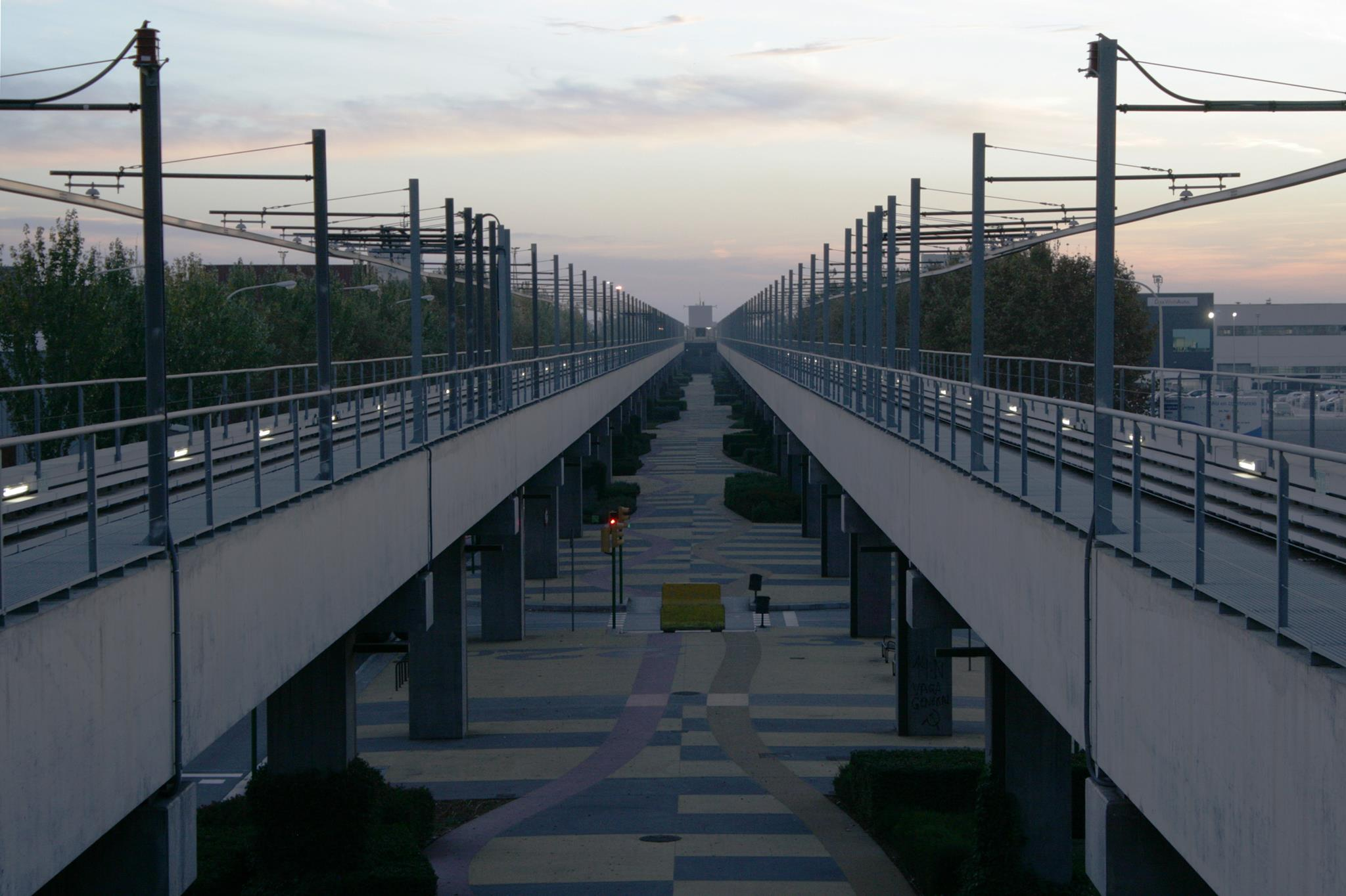 Vista del viaducte de la L10 del metro de Barcelona des de l'estació de Zona Franca